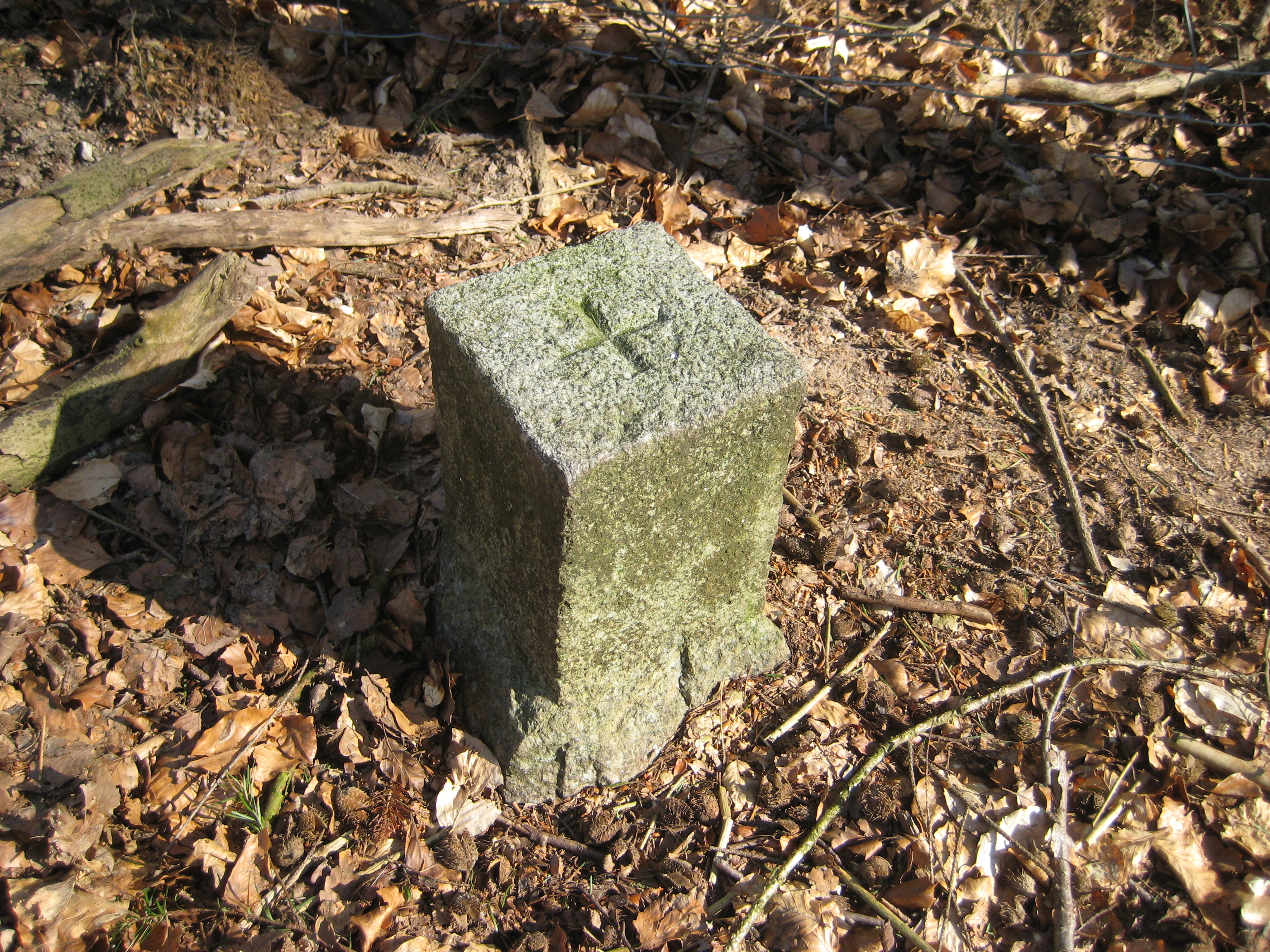 Auf der vermutlichst höchsten Erhebung des Kreises Steinburg, der Itzespitze. Ob dies ein offizieller Vermessungspunkt ist, keine Ahnung.